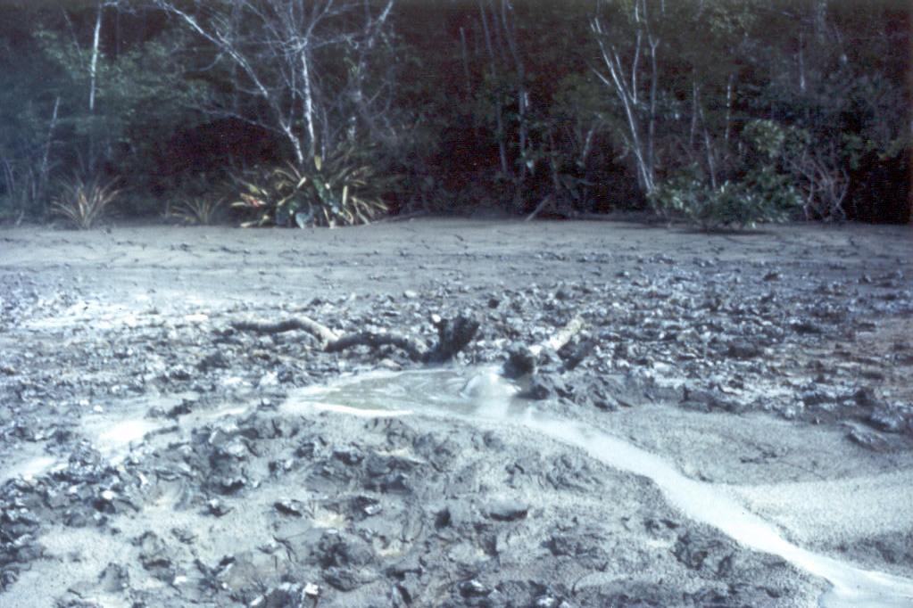 Volcán de lodo de Yagrumito, estado Monagas (Venezuela). Autor: Fev. Foto tomada durante la época de lluvia (año 1967)